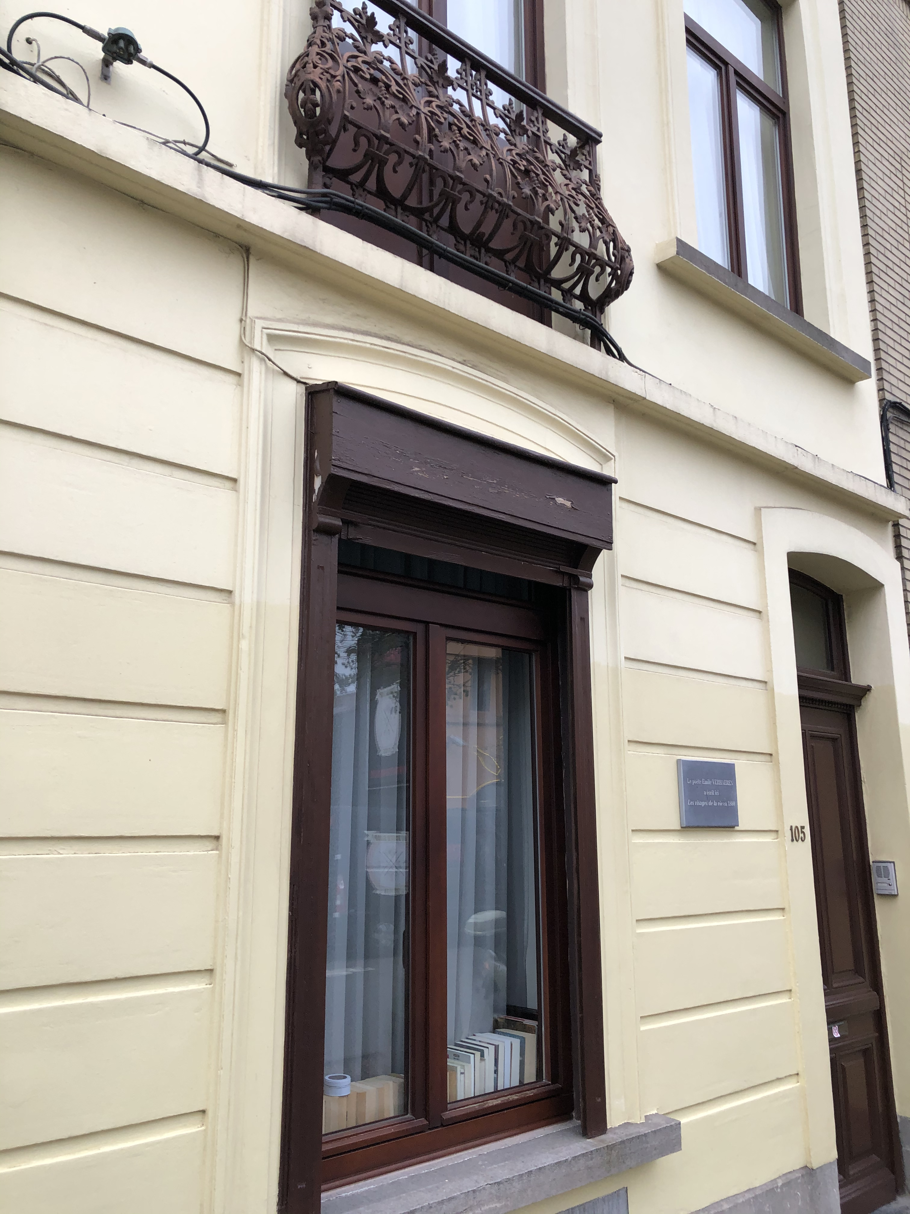 Plaque commémorative Emile Verhaeren